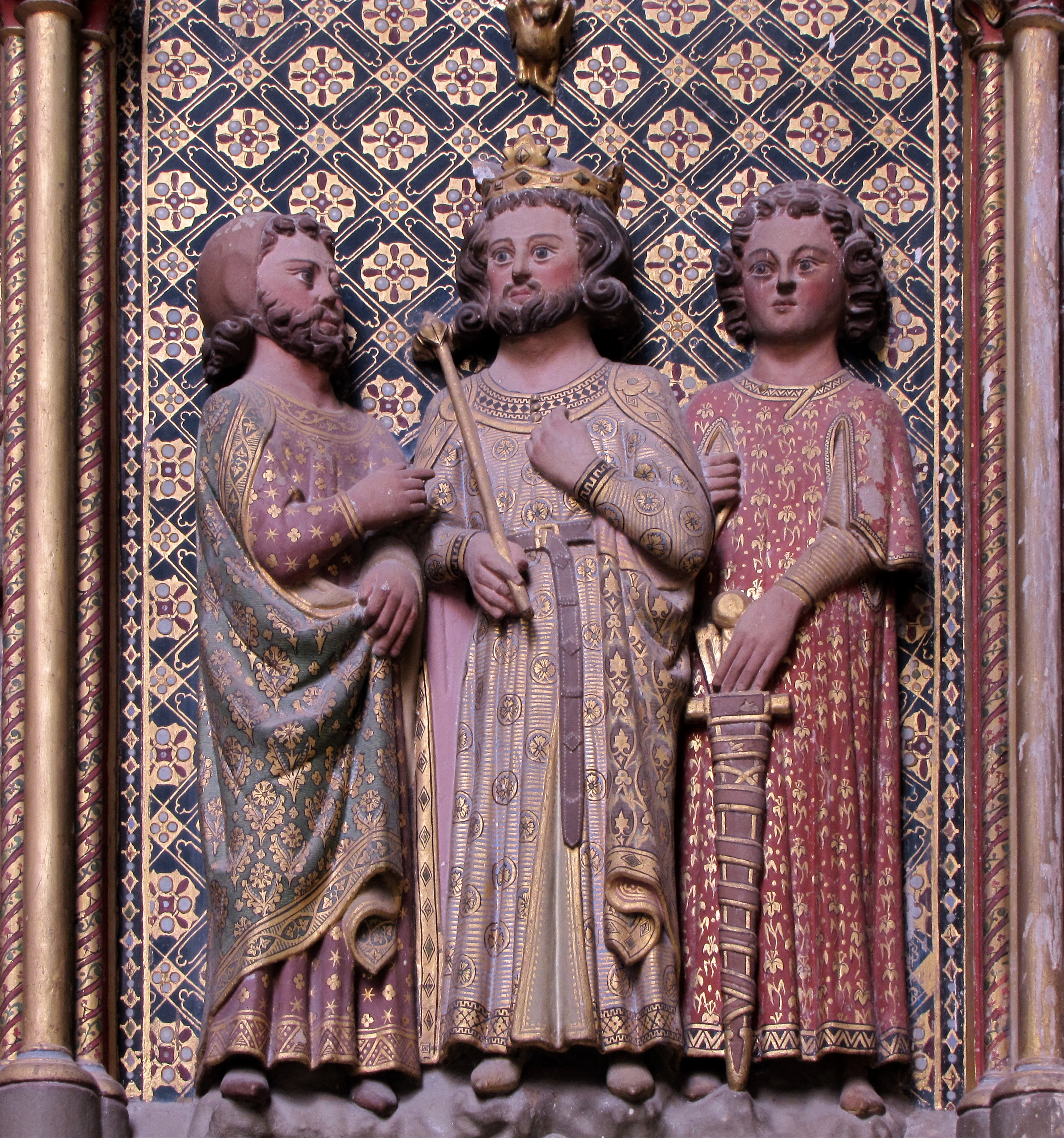 Alsace, Bas-Rhin, Église Saints-Pierre-et-Paul dite Sainte-Richarde (PA00084587, IA00115010). Châsse de Sainte-Richarde : Charles-le-Gros entre un écuyer et un chevalier accusant Ste-Richarde d'adultère. This object is classé Monument Historique in the base Palissy, database of the French furniture patrimony of the French ministry of culture, under the references PM67000872 and IM67005789.